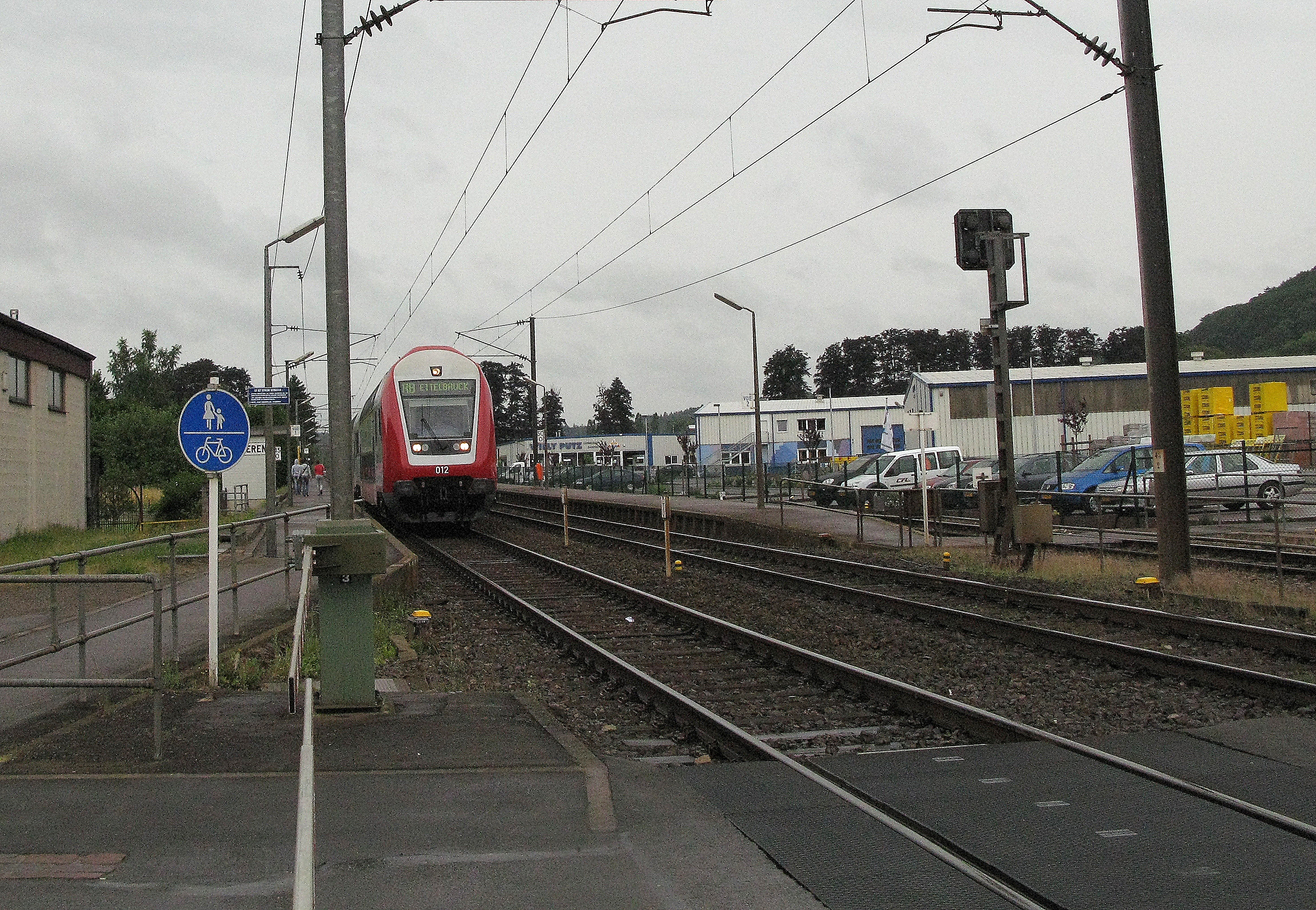 En Dosto an der Gare vu Schieren